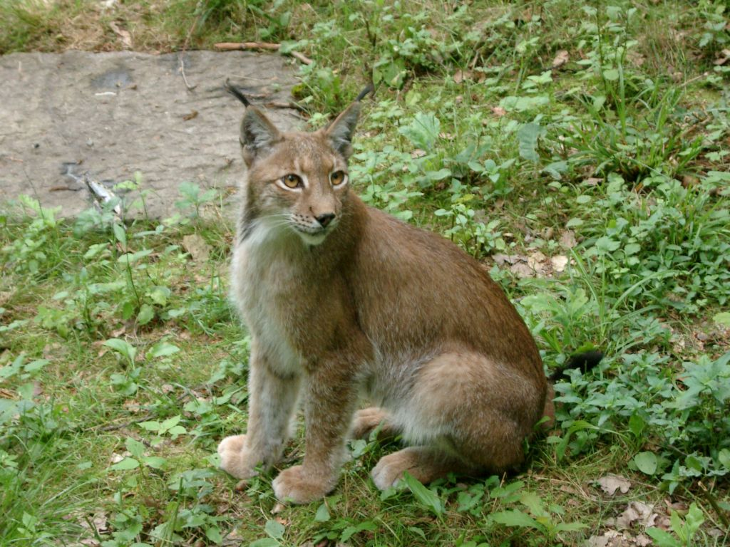 Luchs im Tierpark Fasanerie Wiesbaden